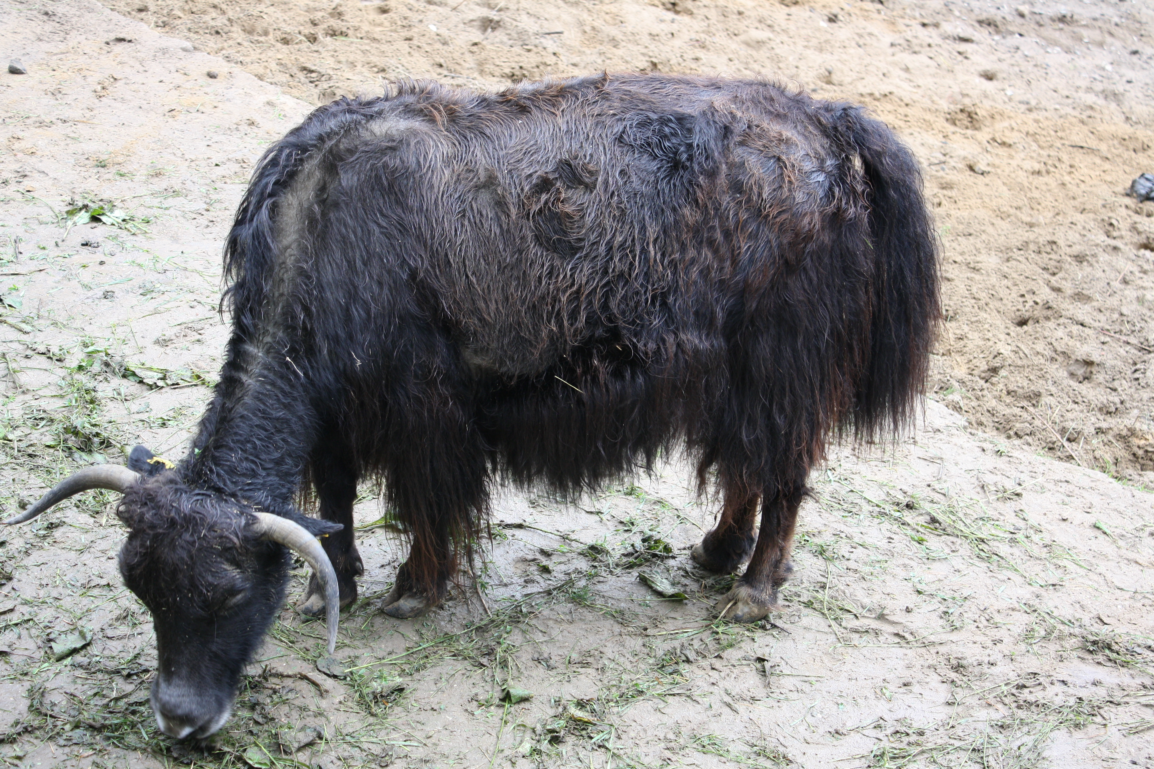 Jak w ogrodzie zoologicznym w Gdańsku.